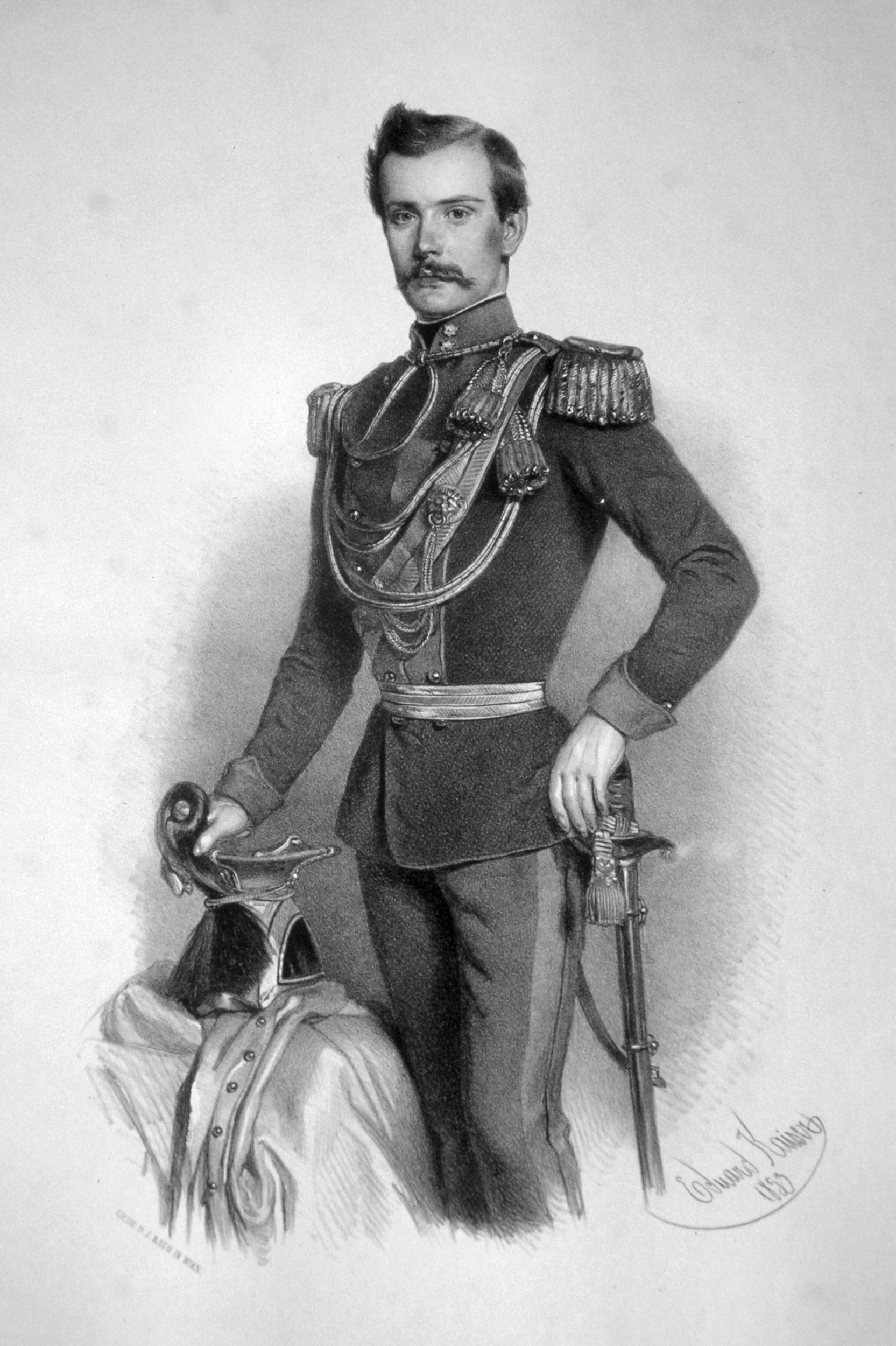 Karl Freiherr von Lasollaye (1828-1910) österreichischer Offizier. Lithographie von Eduard Kaiser1853